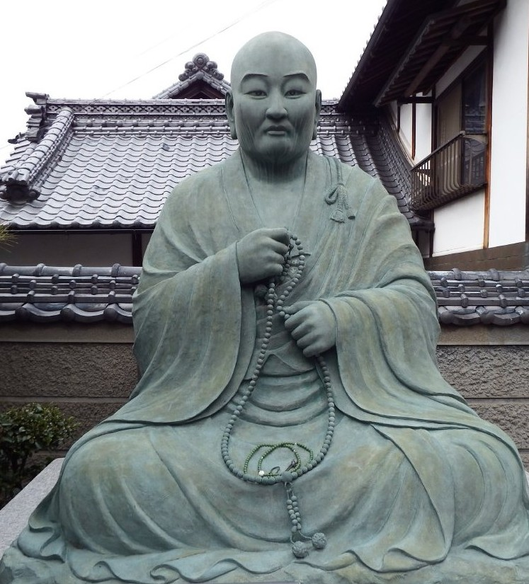 出釈迦寺の求聞持大師